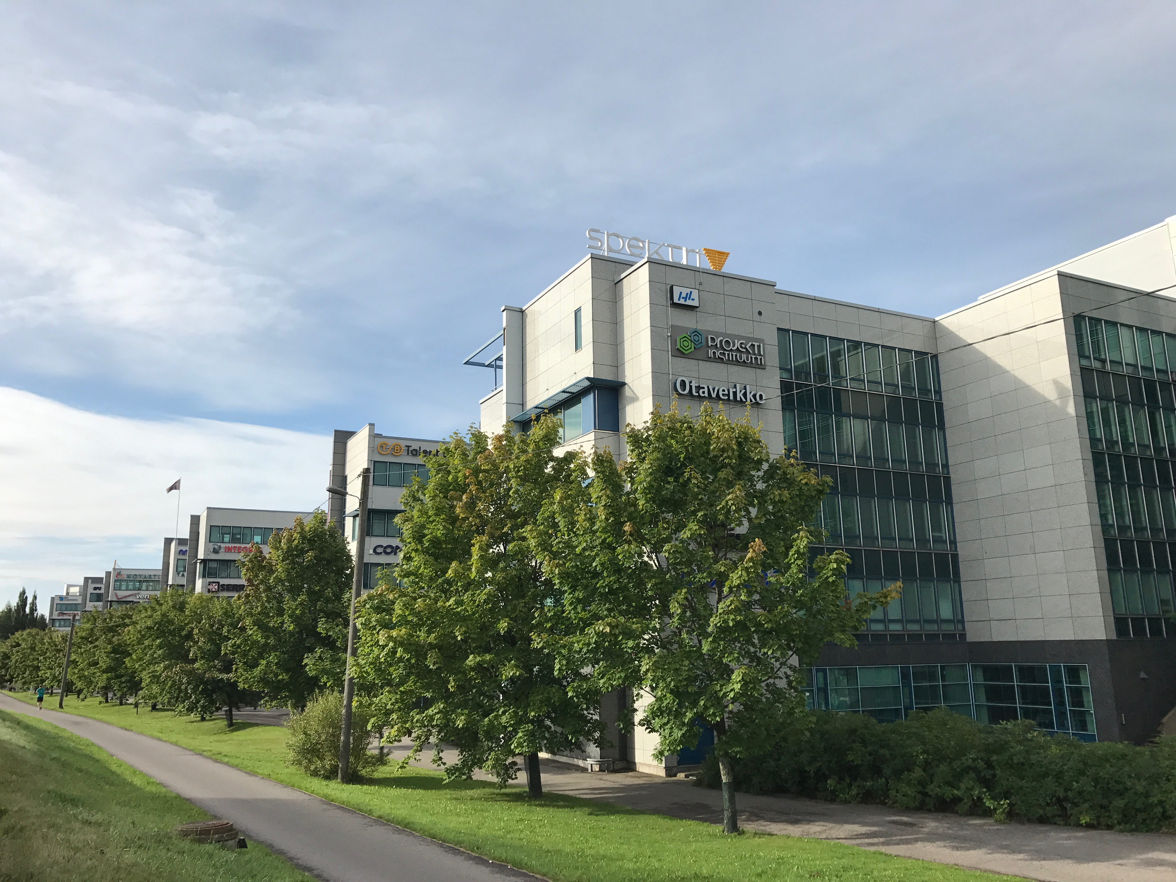 Spektri Business Parkin toimistorakennuksia Kehä I:n varrella Espoon Tapiolassa.